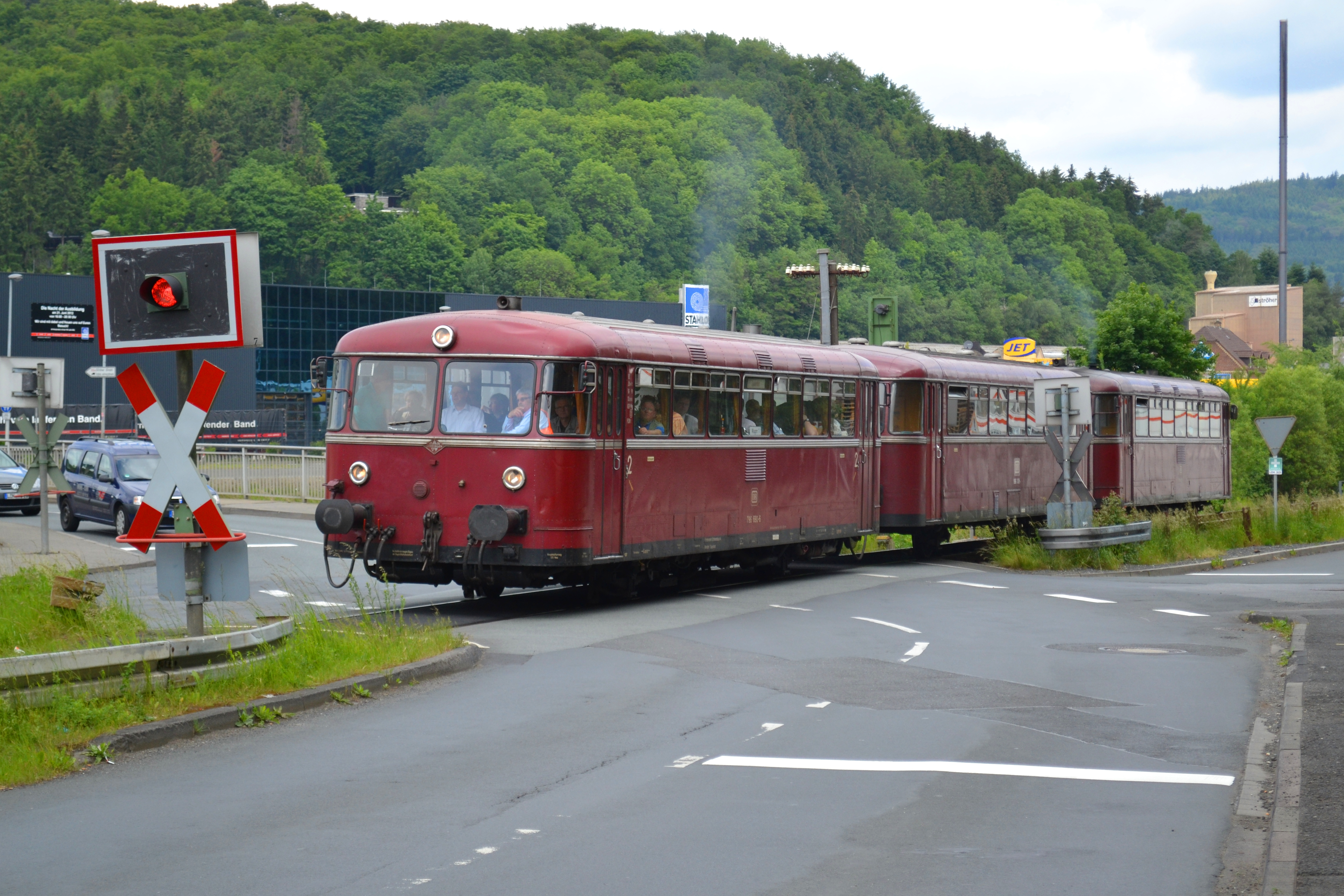 Am 2. Juni 2012 befuhr die DGEG im Rahmen einer Sonderfahrt das 2,2 Kilometer lange Reststück der Dietzhölztalbahn mit einem dreiteiligen Uerdinger Schienenbus.